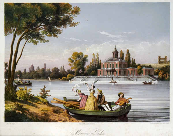 Potsdam, Marmorpalais am Heiligen See (Marmorpalais bei Potsdam) Farb. Lithographie mit Tonplatte (Farbdruck J. Hesse in Berlin) b. Sacco Bln., 32 x 41 cm